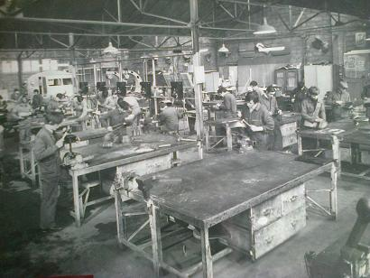 Les ateliers du collège de la carrosserie, à Nanterre. L'établissement a ensuite été transféré à Villeneuve-la-Garenne où il a pris le nom de Lycée Charles Petiet